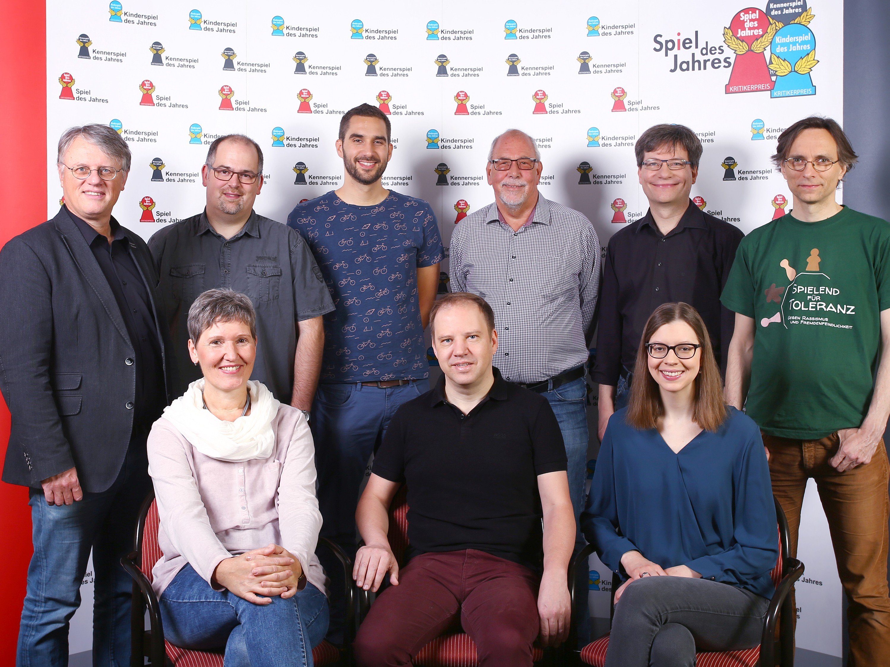 Stehend von links: Harald Schrapers, Tim Koch, Martin Klein, Wieland Herold, Bernhard Löhlein, Udo Bartsch. Sitzend von links: Sandra Lemberger, Karsten Grosser, Julia Zerlik.